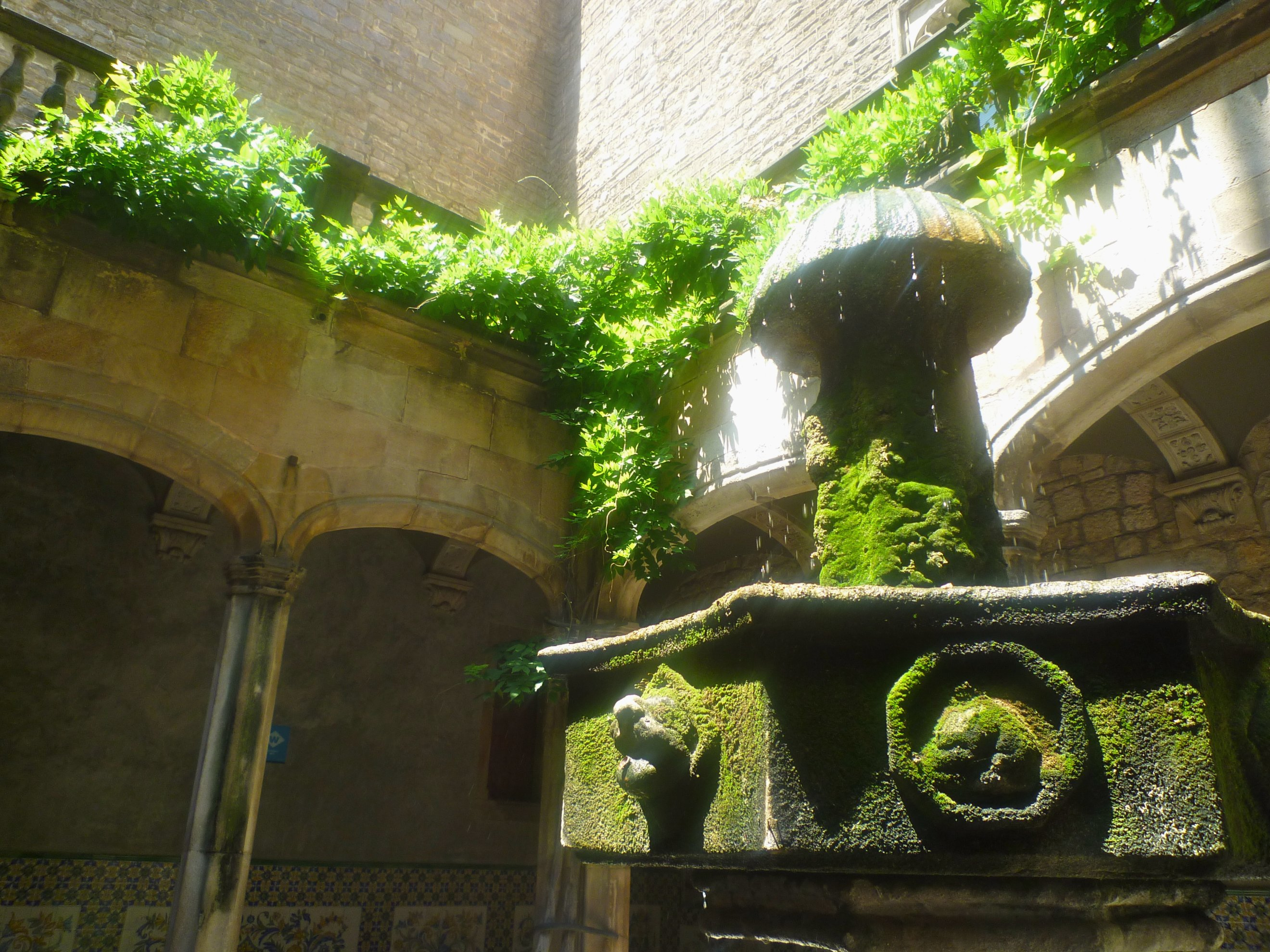 Casa de l'Ardiaca (Barcelona)